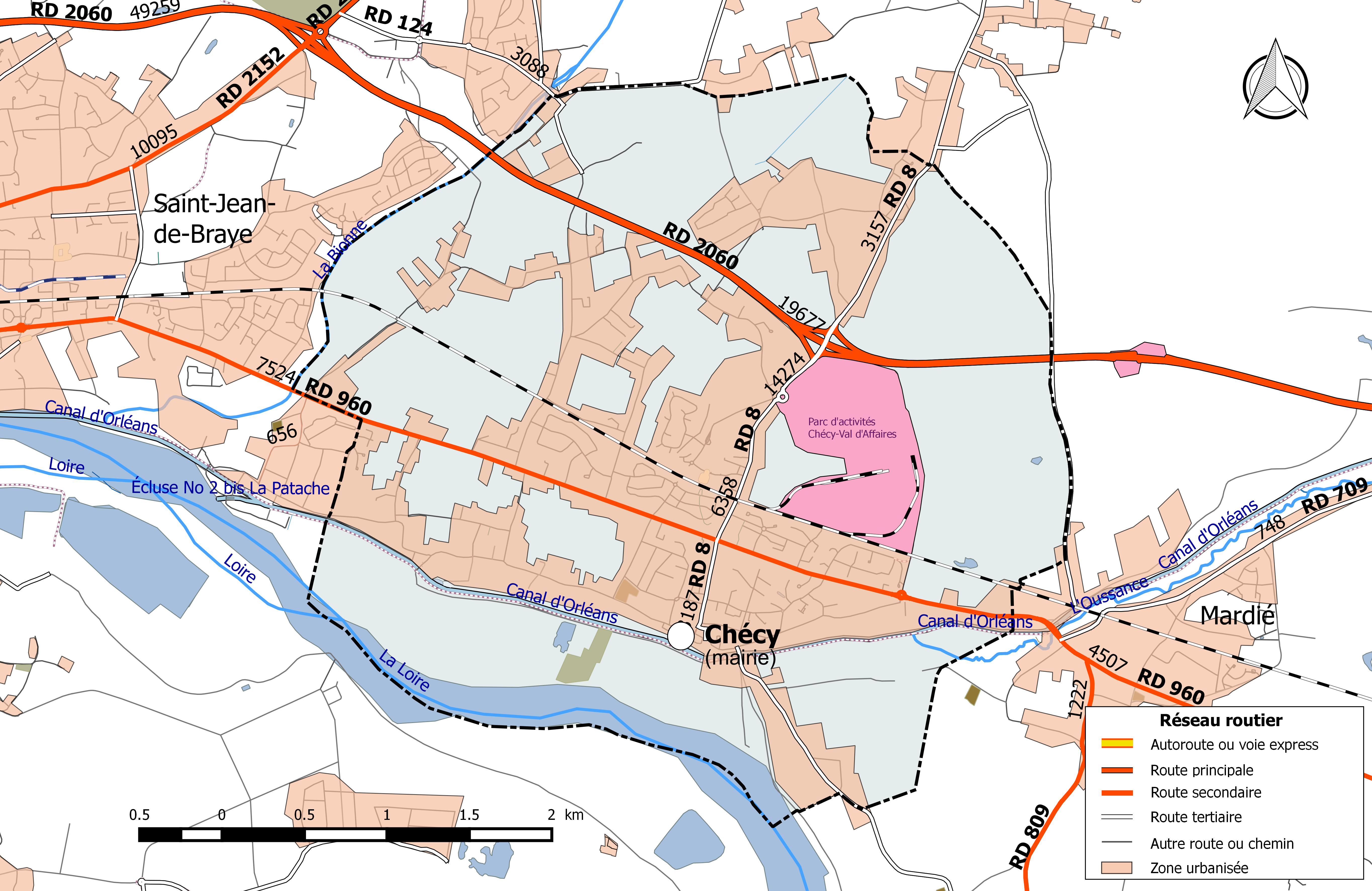 Carte du réseau routier de la commune de Chécy.